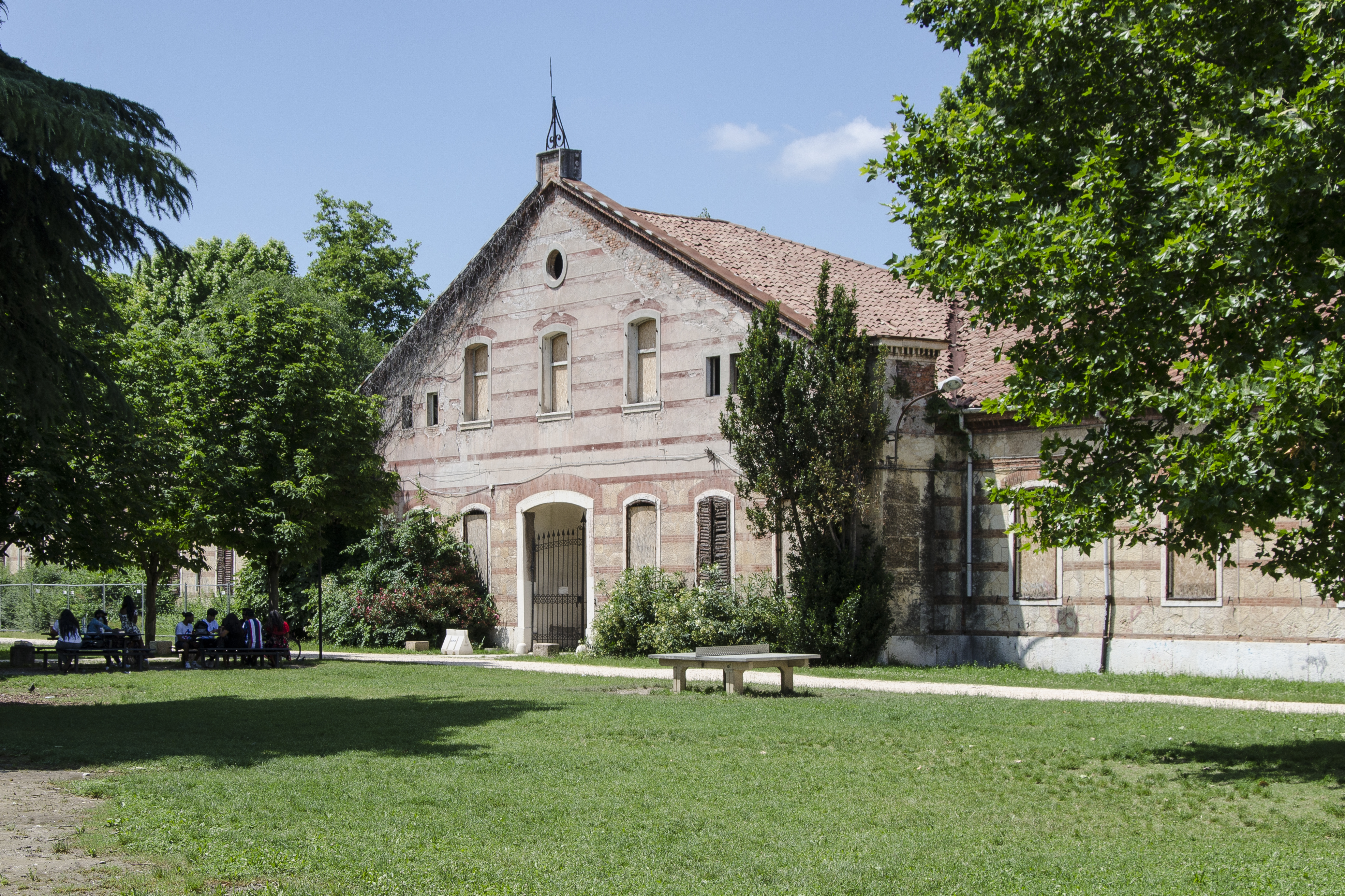 Arsenale di Verona